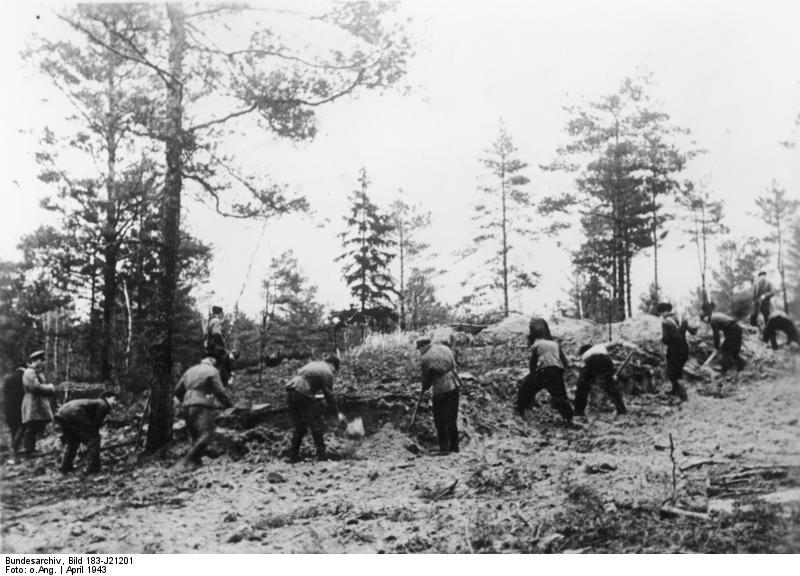 This description has been identified as biased or incorrect: Propaganda and lies.Zentralbild II. Weltkrieg 1939 - 45 Im April 1943 starten die deutschen Faschisten die antisowjetische Propaganda über den Massenmord im Katyner Wald, 15 klm nw. von Smolensk, wo sie Massengräber mit ca. 11 000 ermordeten kriegsgefangenen Polen als Greueltaten der Sowjets erklärten. ( Die Außerordentliche Staatliche Kommission unter Leitung des Akademikers Burdenko stellte in ihrem Untersuchungsbericht vom 24.01.1944 fest, dass die Ermordungen nicht wie die Faschisten behauptet hatten, im Frühjahr 1940 sondern erst im Herbst 1941, also von den Faschisten selbst, stattgefunden haben.) U. B. z: den Beginn der Ausgrabungen der Massengräber durch die deutschen Faschisten im Wald von Katyn. April 1943 1942 - 43